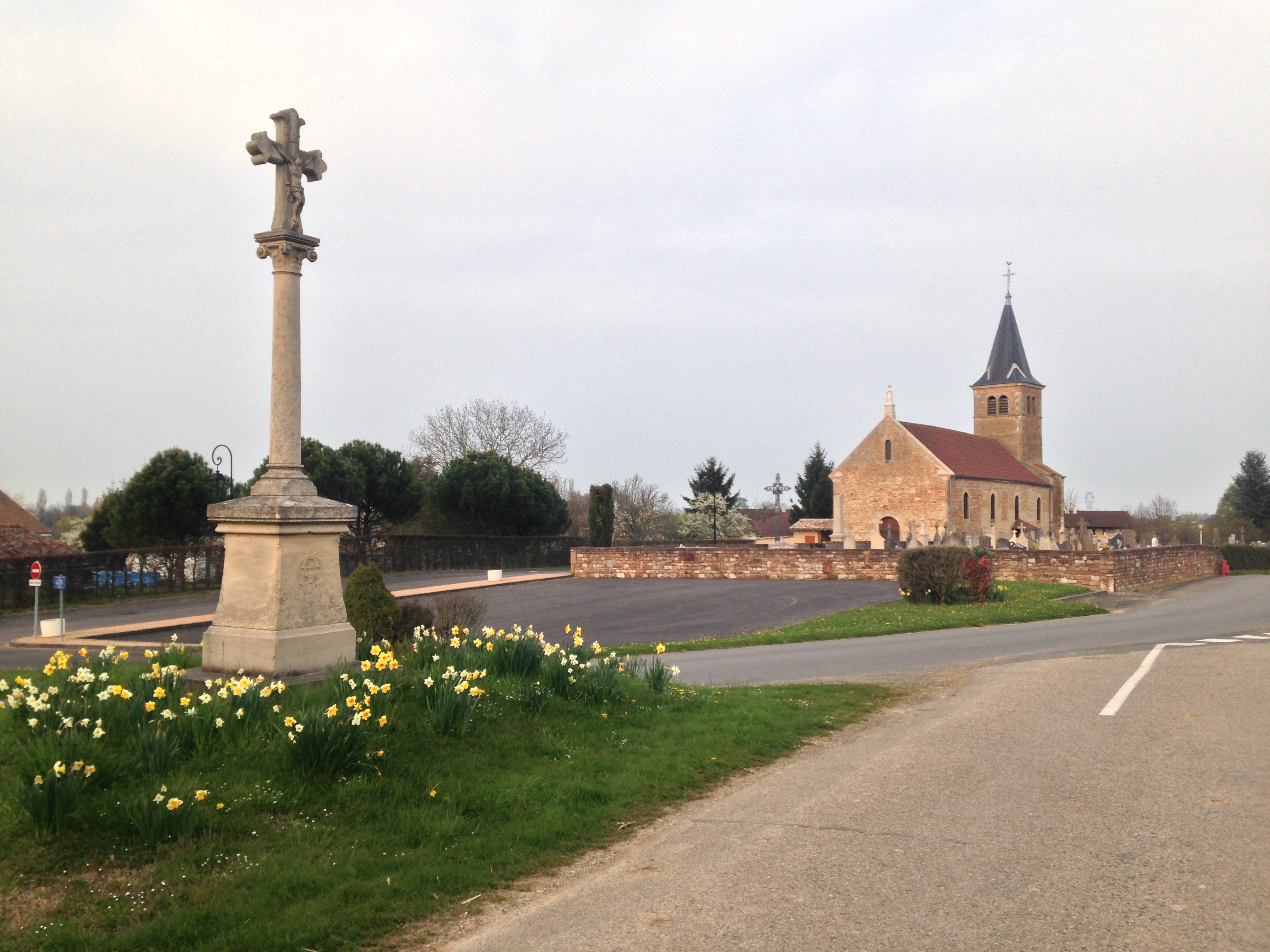 L'Église du village de Laiz avec la croix au premier plan